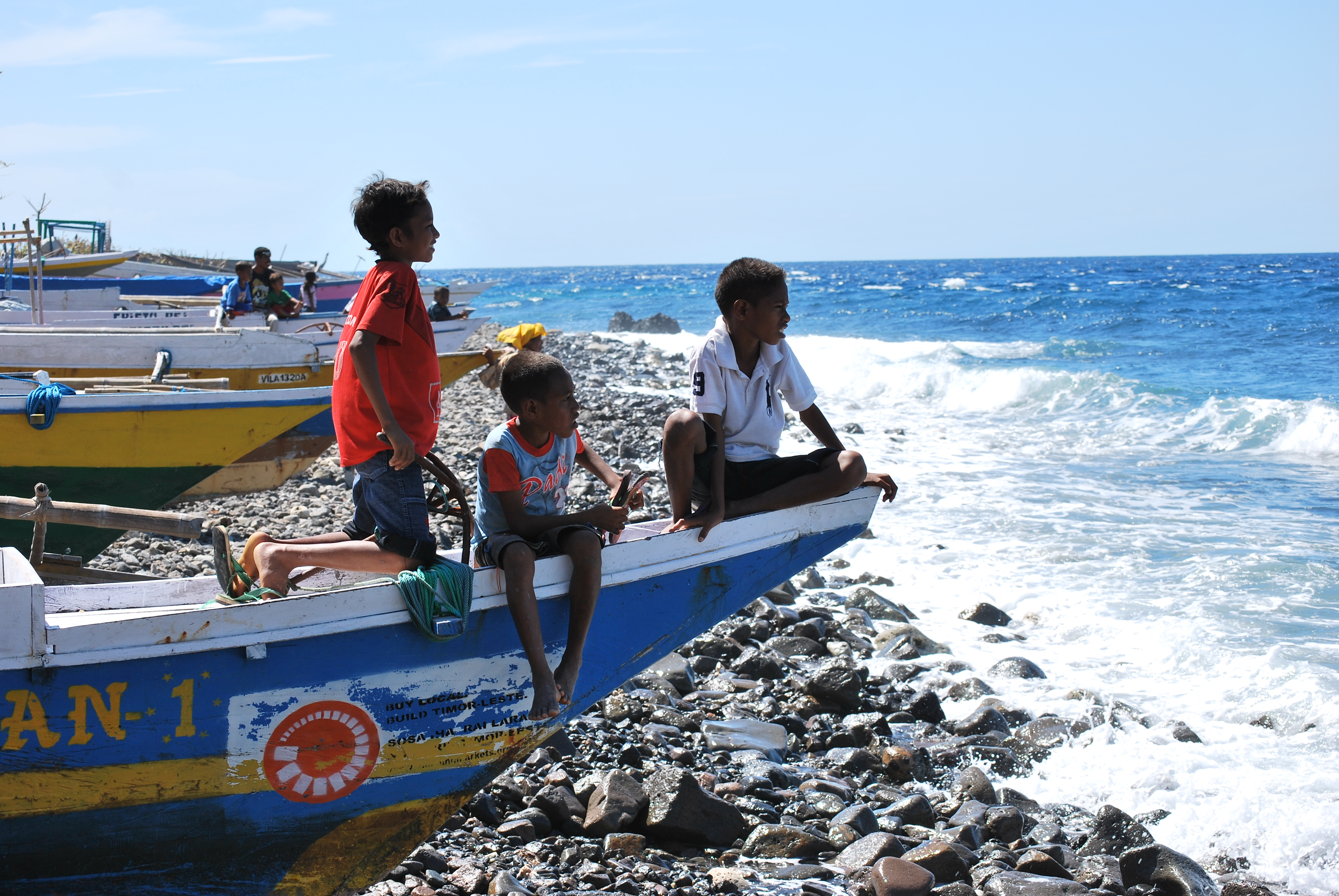 Kinder auf einem Fischerboot in Makili